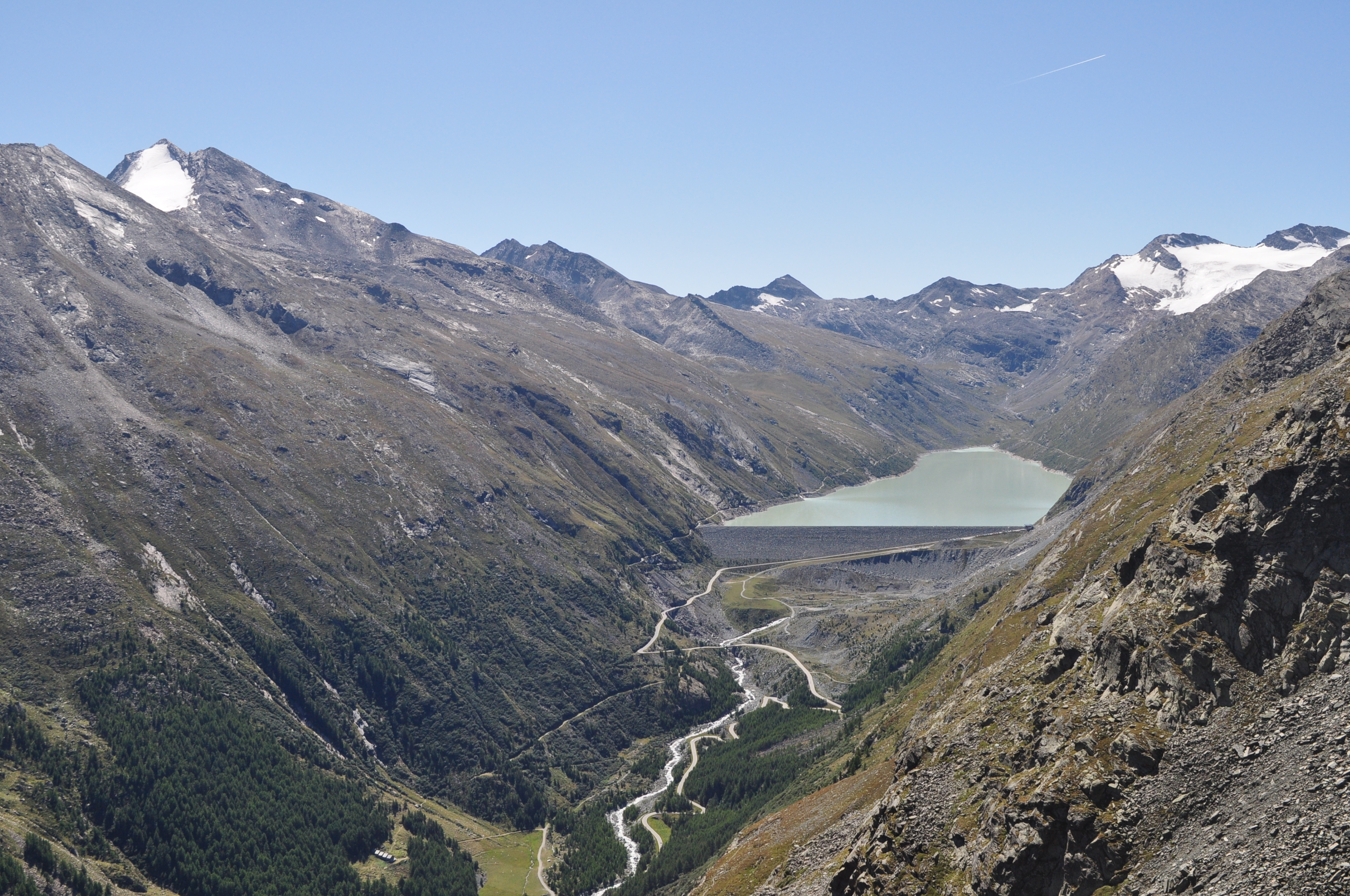 Barrage de Mattmark